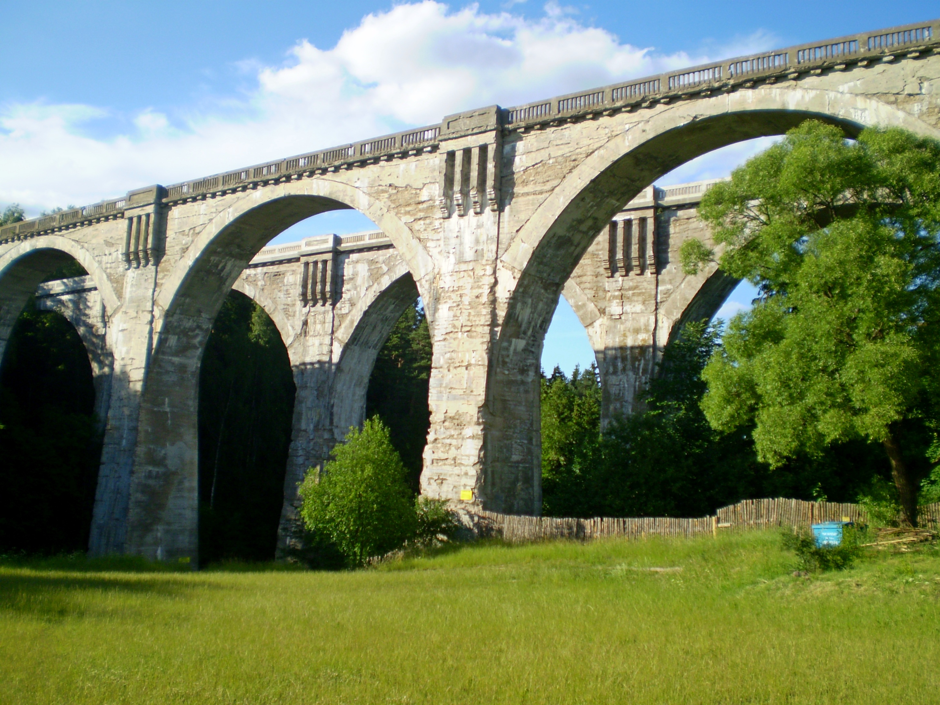 Stańczyki - dwa wiadukty kolejowe na rz. Błądziance (zabytek nr A-1290)